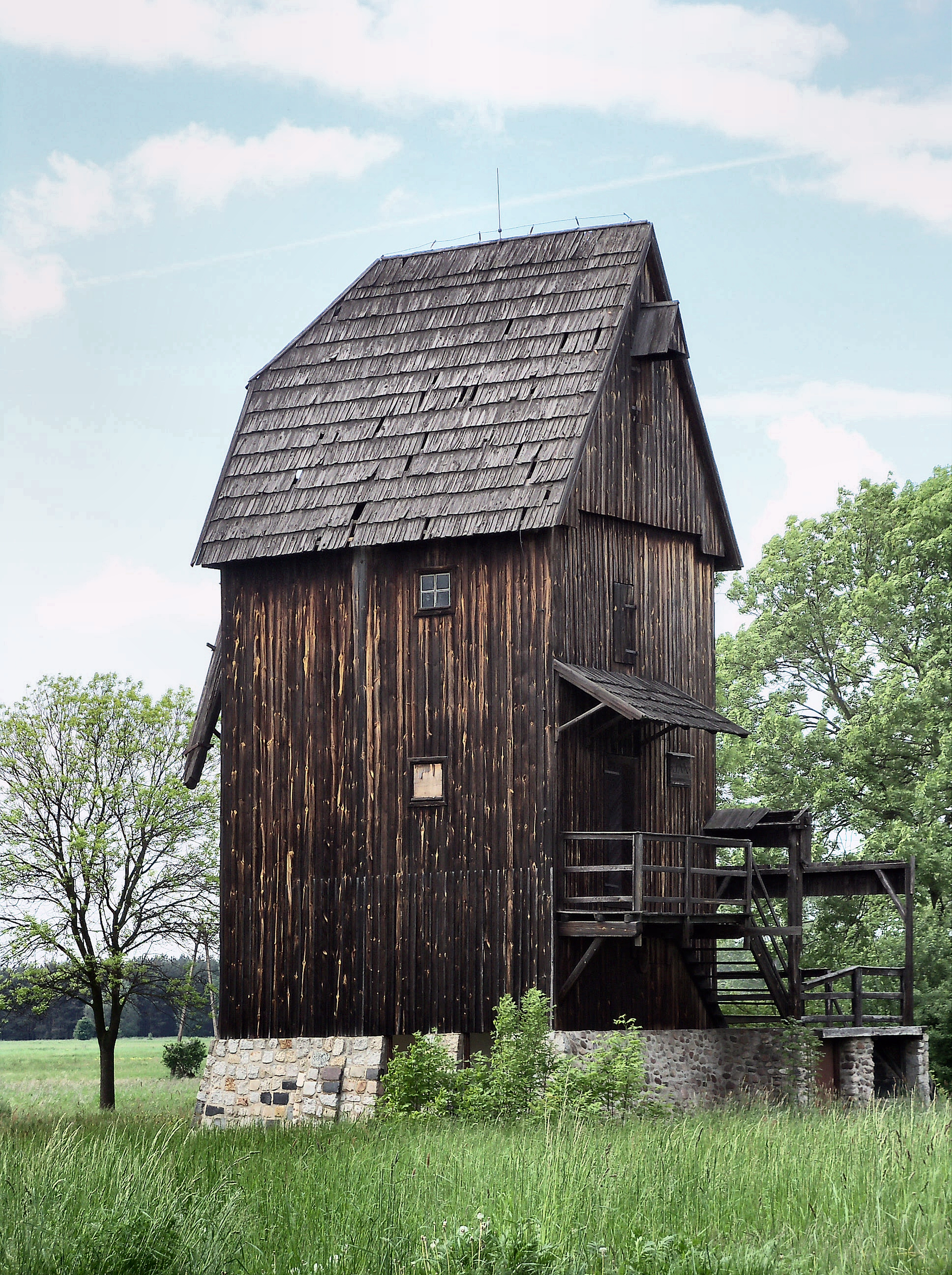 Szlichtyngowa, wiatrak koźlak (nr 343), 1757